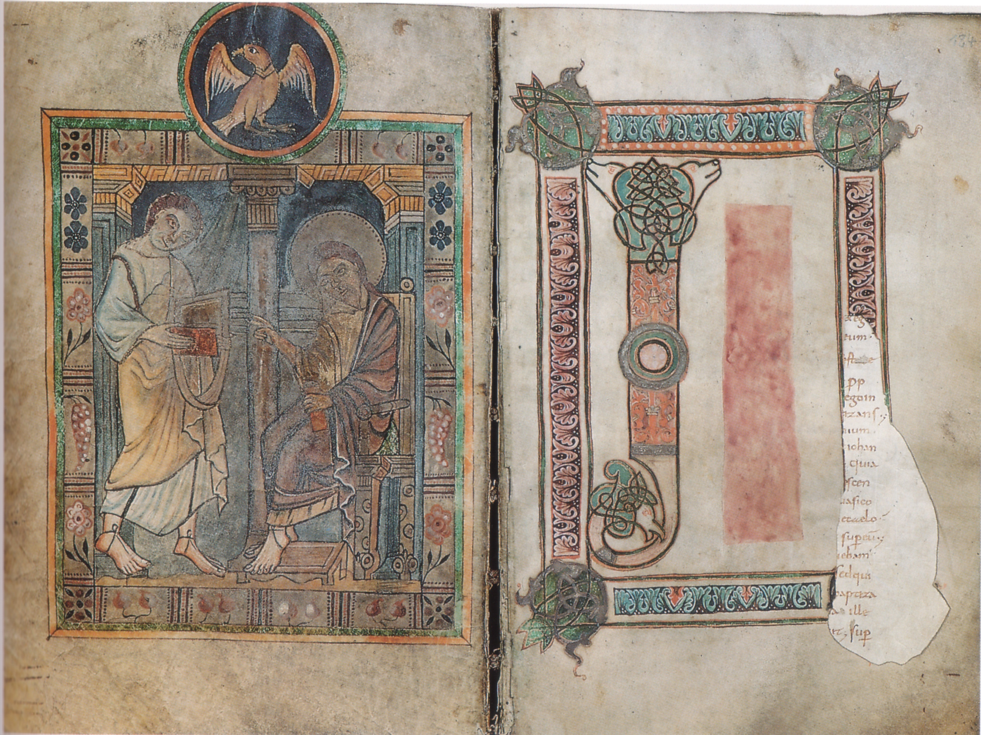 Gent, Sint-Baafskapittel, Ms. 13 (fol. 145v-146r) (Saint-Amand, um 800) Evangelistenbild, Initiale